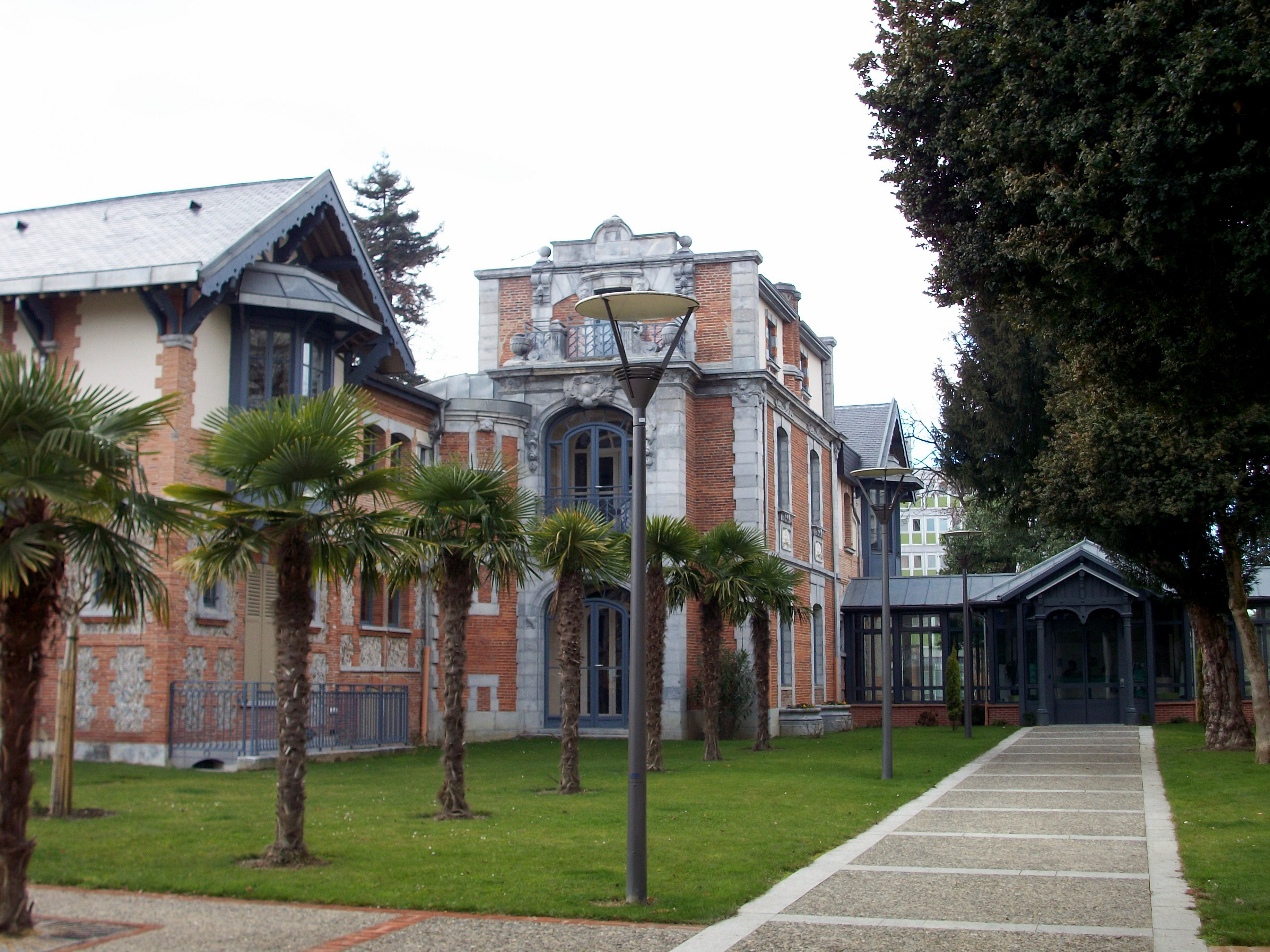 Villa Fould, devenue siège du Parc National des Pyrénées après rénovation par le groupement d'architectes GCAU (Parc Paul Chastelain, Tarbes, Hautes-Pyrénées, France)